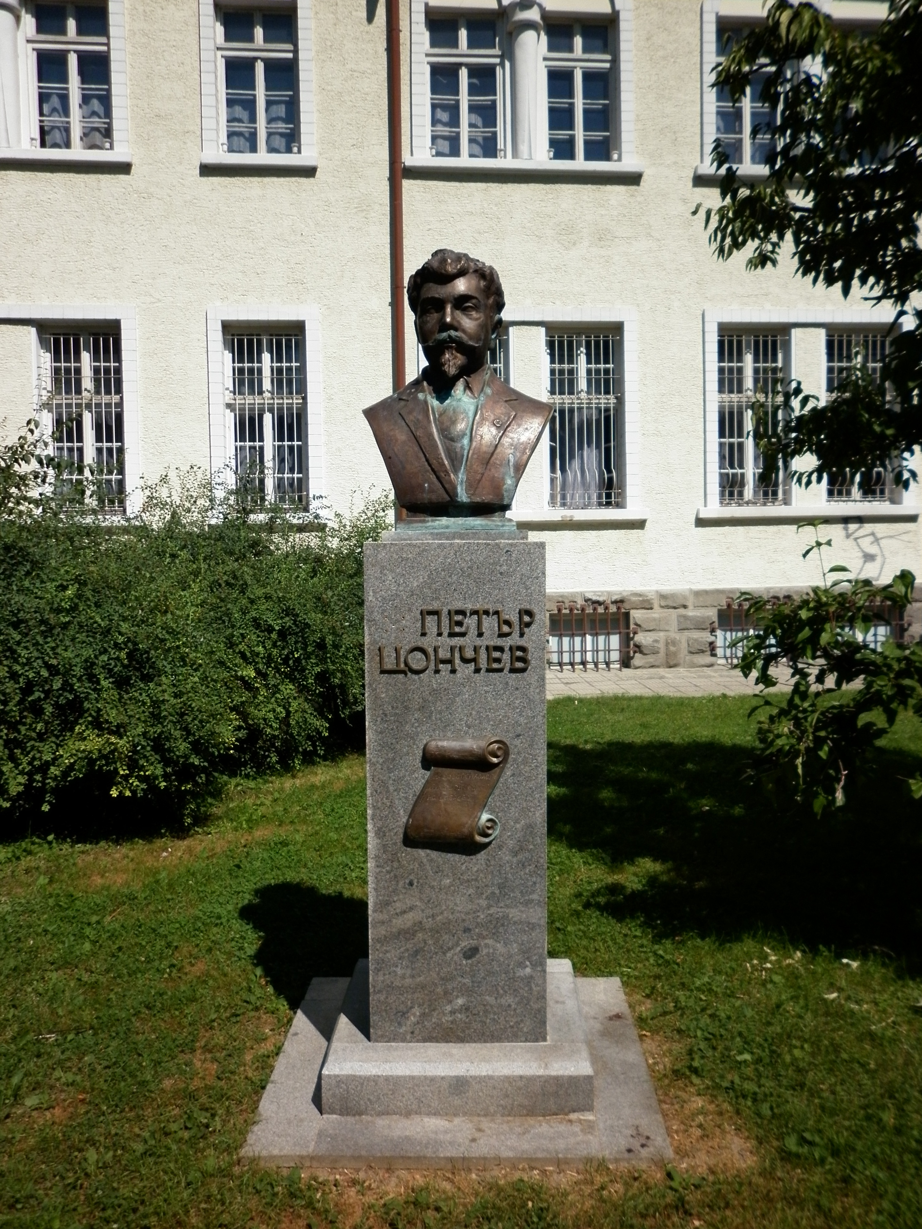 Паметник на Петър Цончев